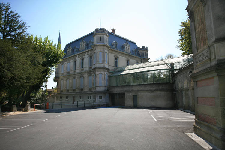 Château de Val-Seille - the village of Courthézon, Vaucluse, France